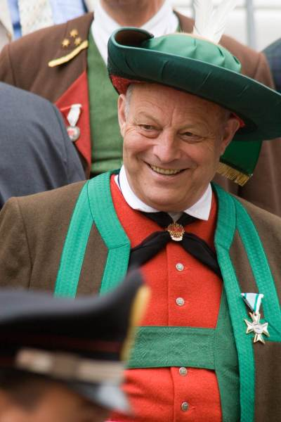 Luis Durnwalder aus Südtriol, Italien.